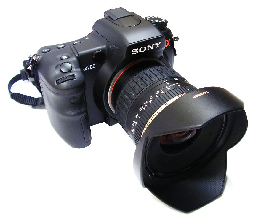 Sony alpha 700 mit Tamron 11-18